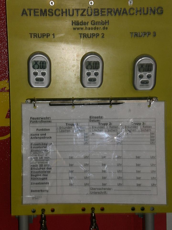 Atemschutzüberwachungstafel